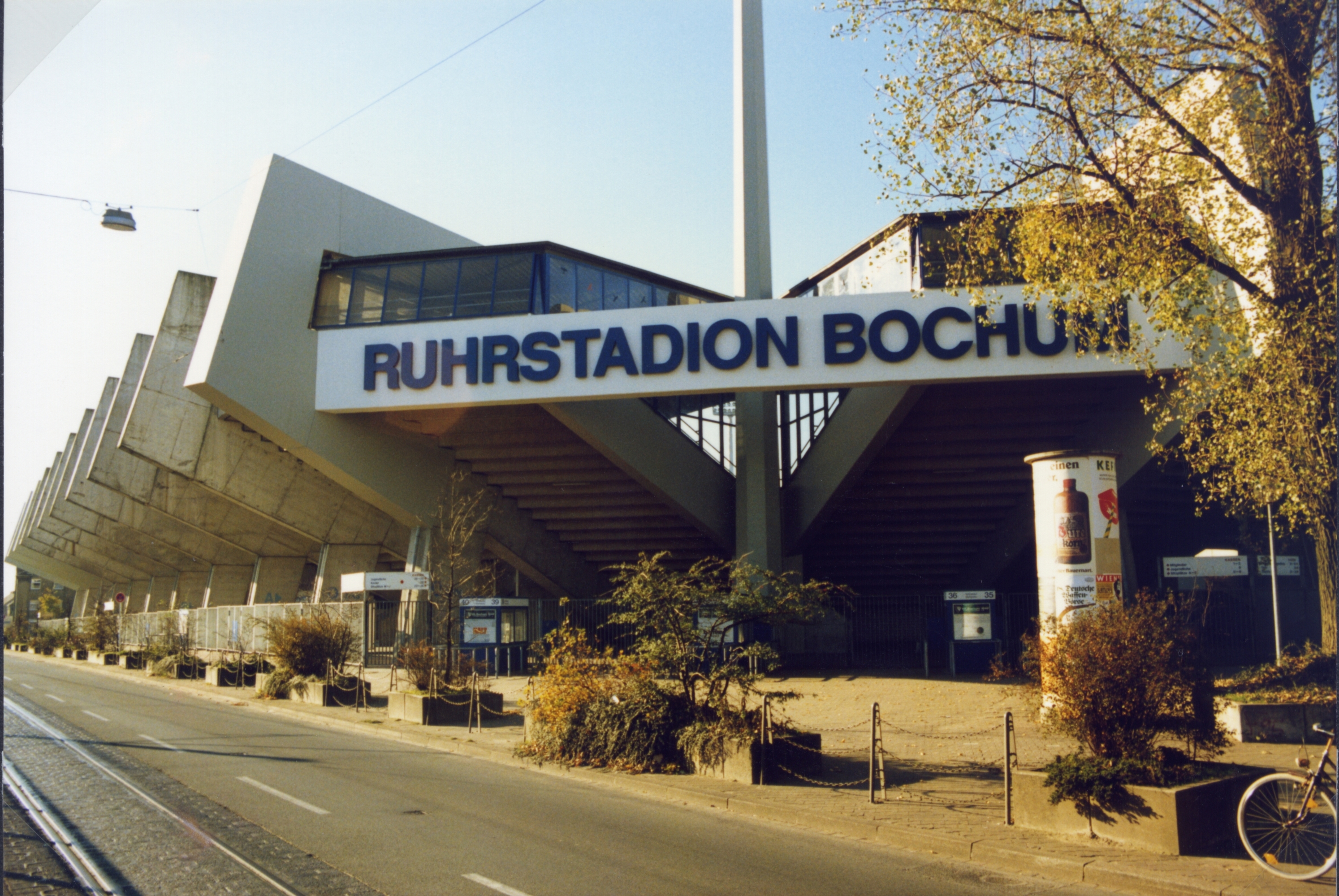 Eingescantes Foto von 1988